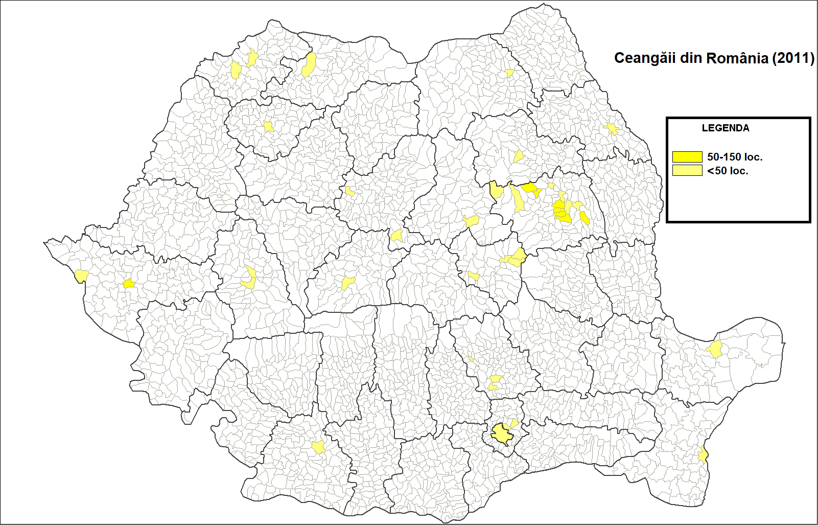 Distribuția ceangăilor pe unitățile administrativ-teritoriale din România (2011).